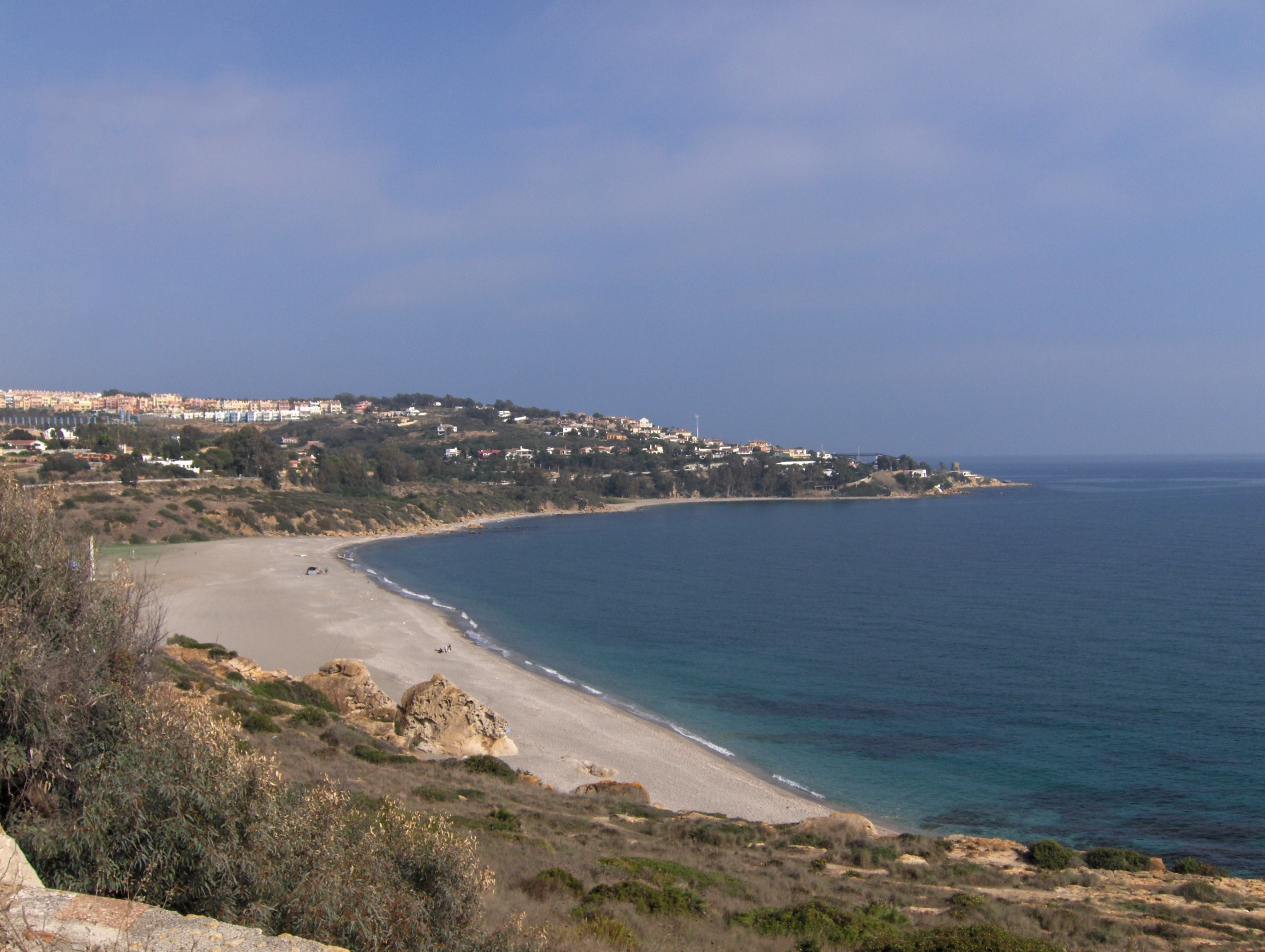 Punta Chullera (Manilva) vista desde Torreguadiaro (San Roque), España.